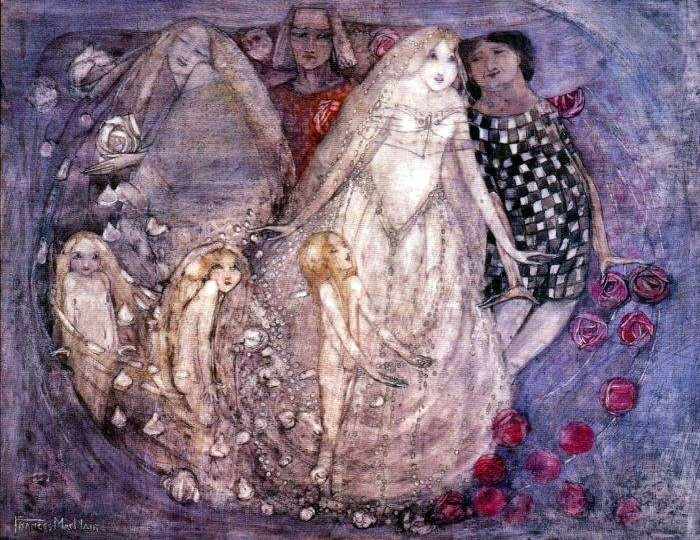 A Paradox